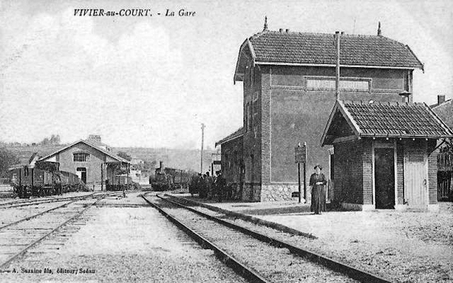 Intérieur de la gare de Vivier-au-Court, édifiée en 1911, au début du XXe siècle. Le bâtiment principal de l'ancienne gare est toujours présent en 2014.